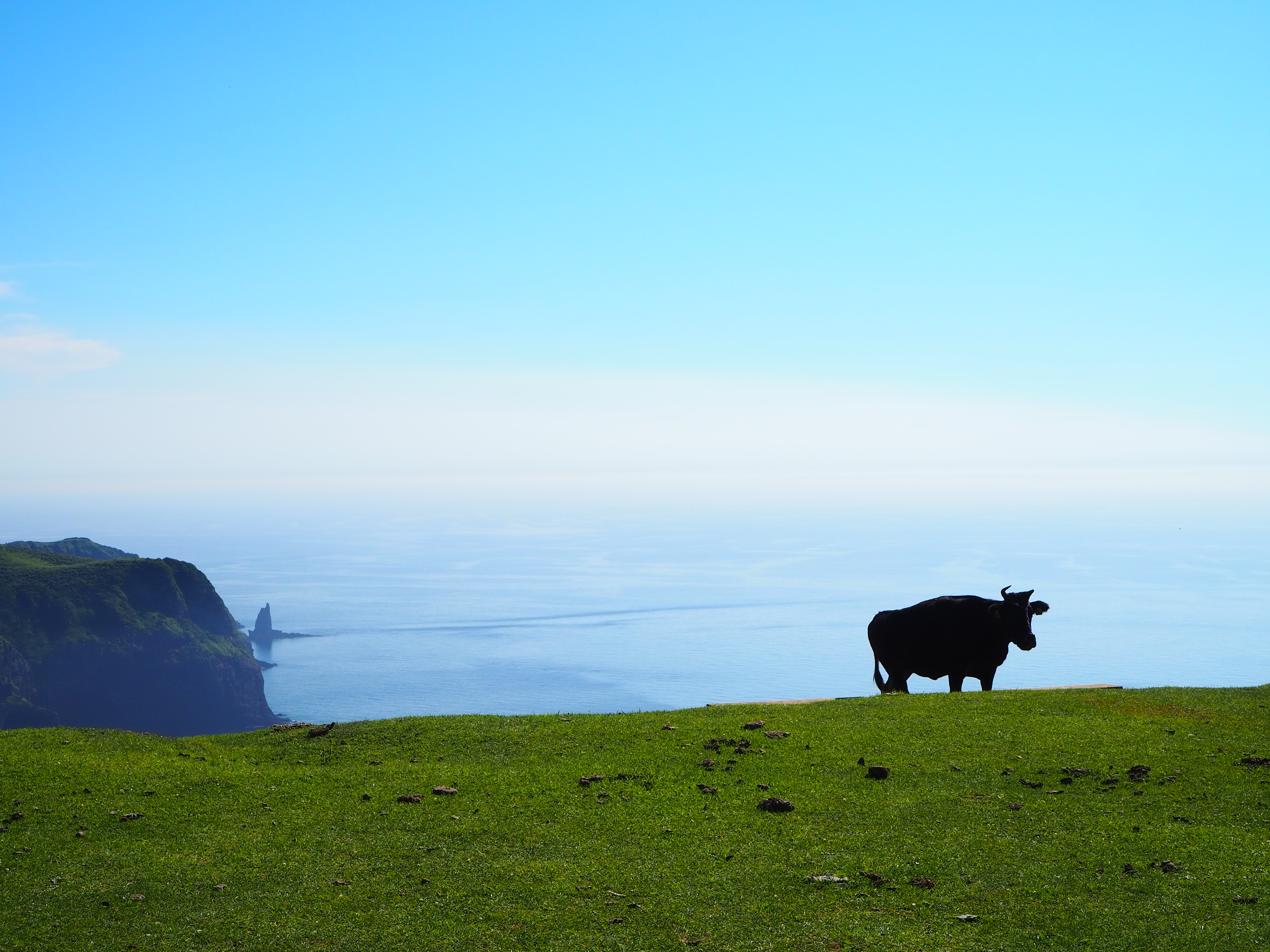 摩天崖頂上付近で見られる、放牧の牛との景観Olympus E-M10 Mark III